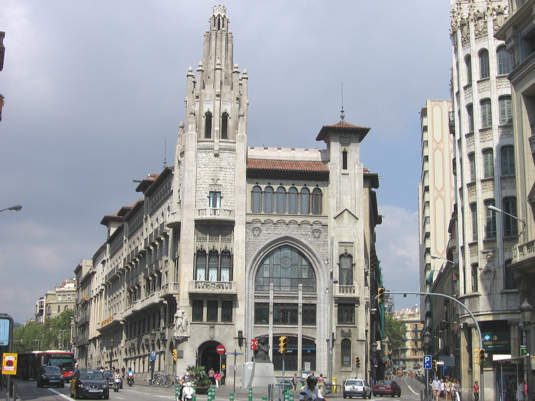 Caixa de Pensions i d'Estalvis de Barcelona (Via Laietana), Enric Sagnier.